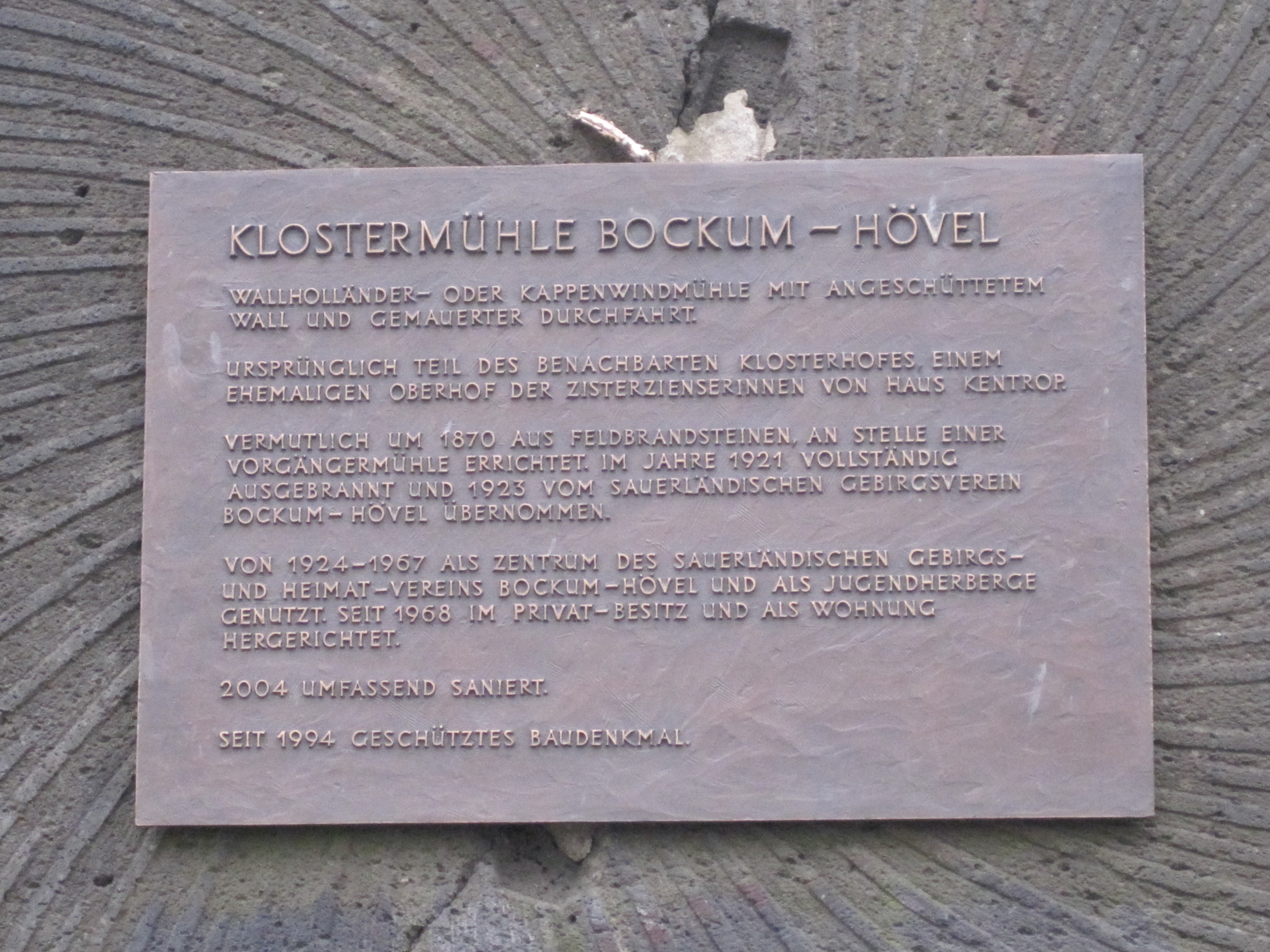 Das Foto zeigt die Informationstafel des Heimatvereins Hamm vor der Klostermühle Bockum-Hövel, Hamm/Westfalen.